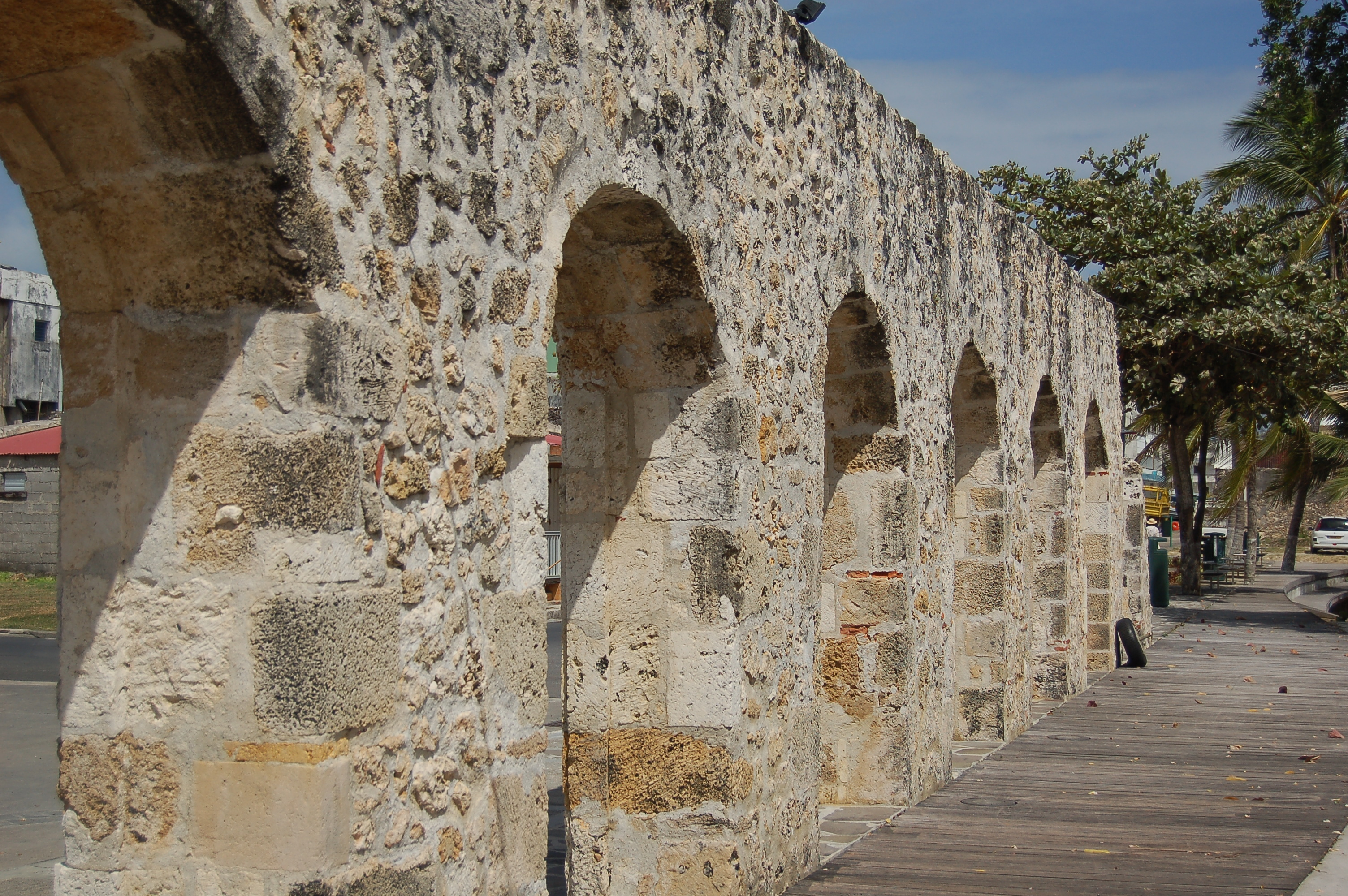 Ancienne fabrique de limonade, Le Moule, Guadeloupe